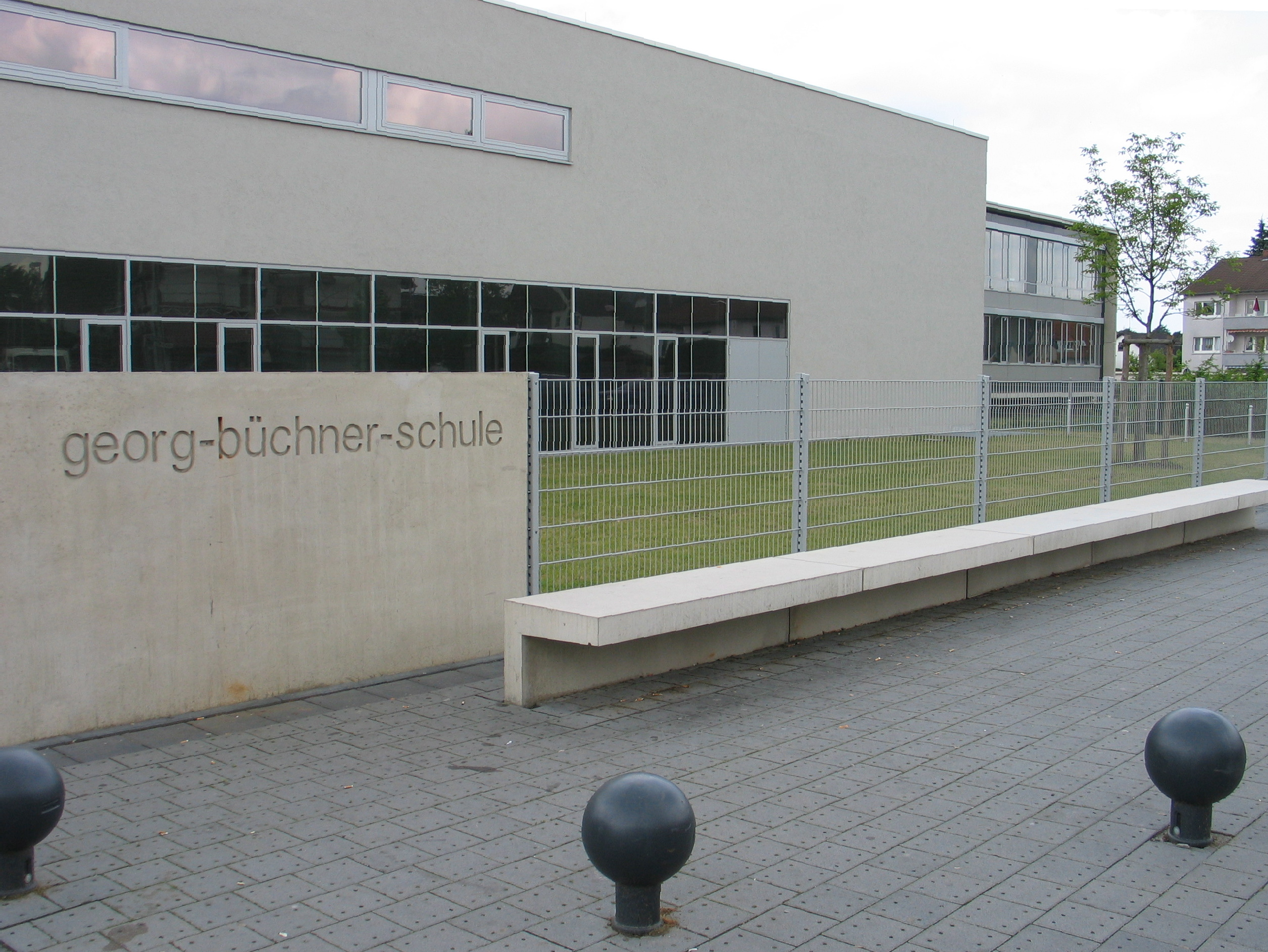 Georg-Büchner-Schule Rodgau-Jügesheim, Haupteingang (Neubau, 1. Bauabschnitt)